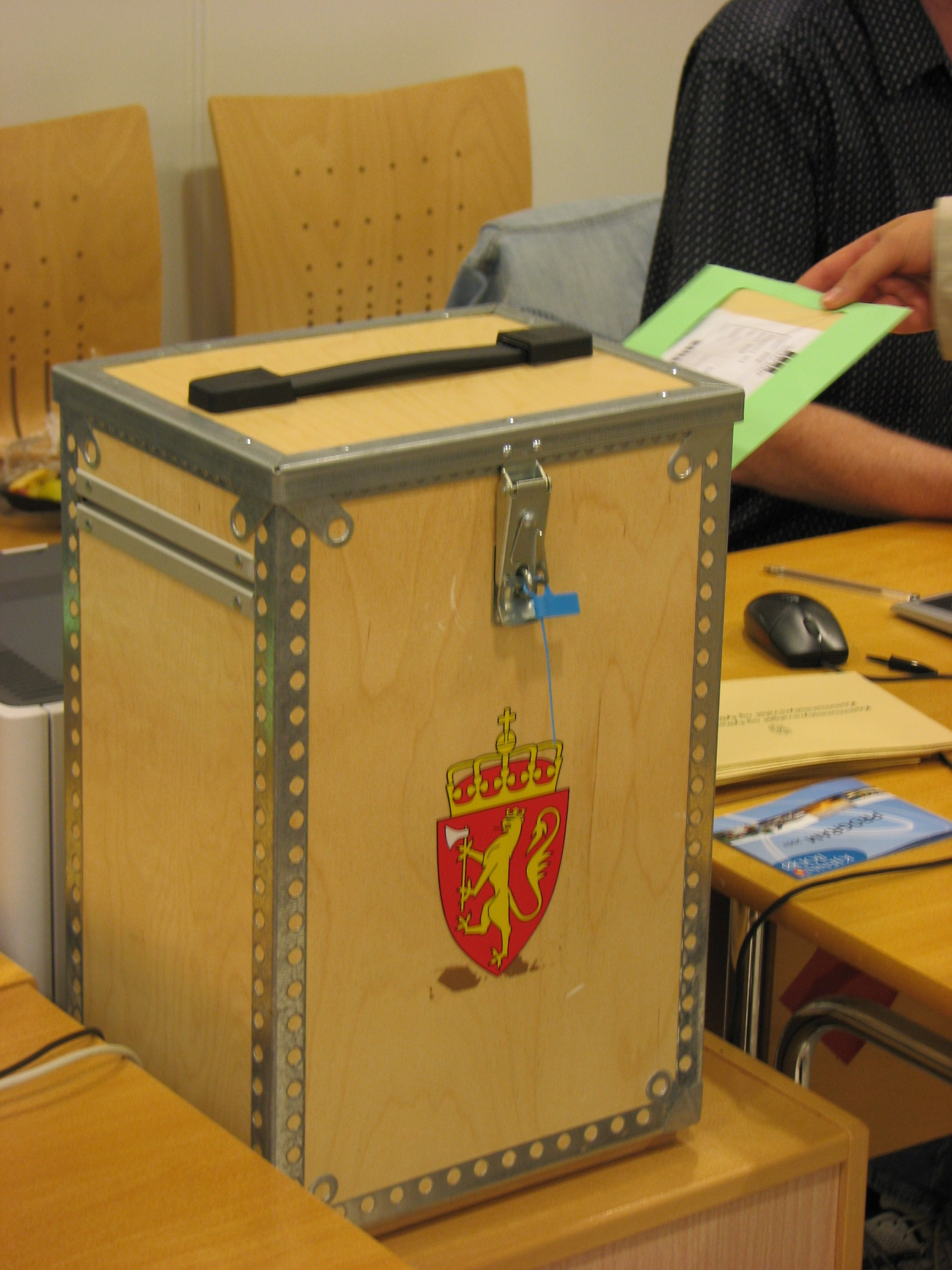 Forhandsstemming, Stemmeurnen